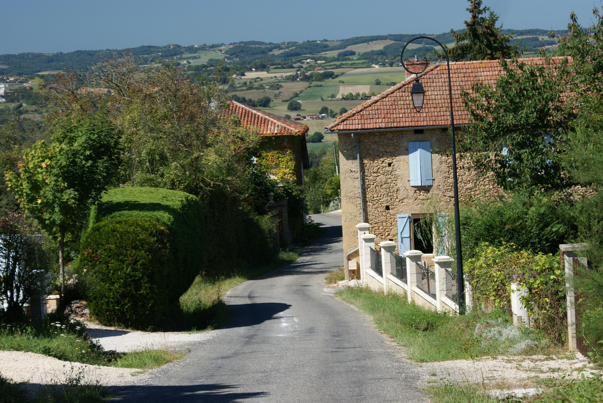 In Mondilhan loopt de D55D in westelijke richting richting Boulogne sur Gesse.